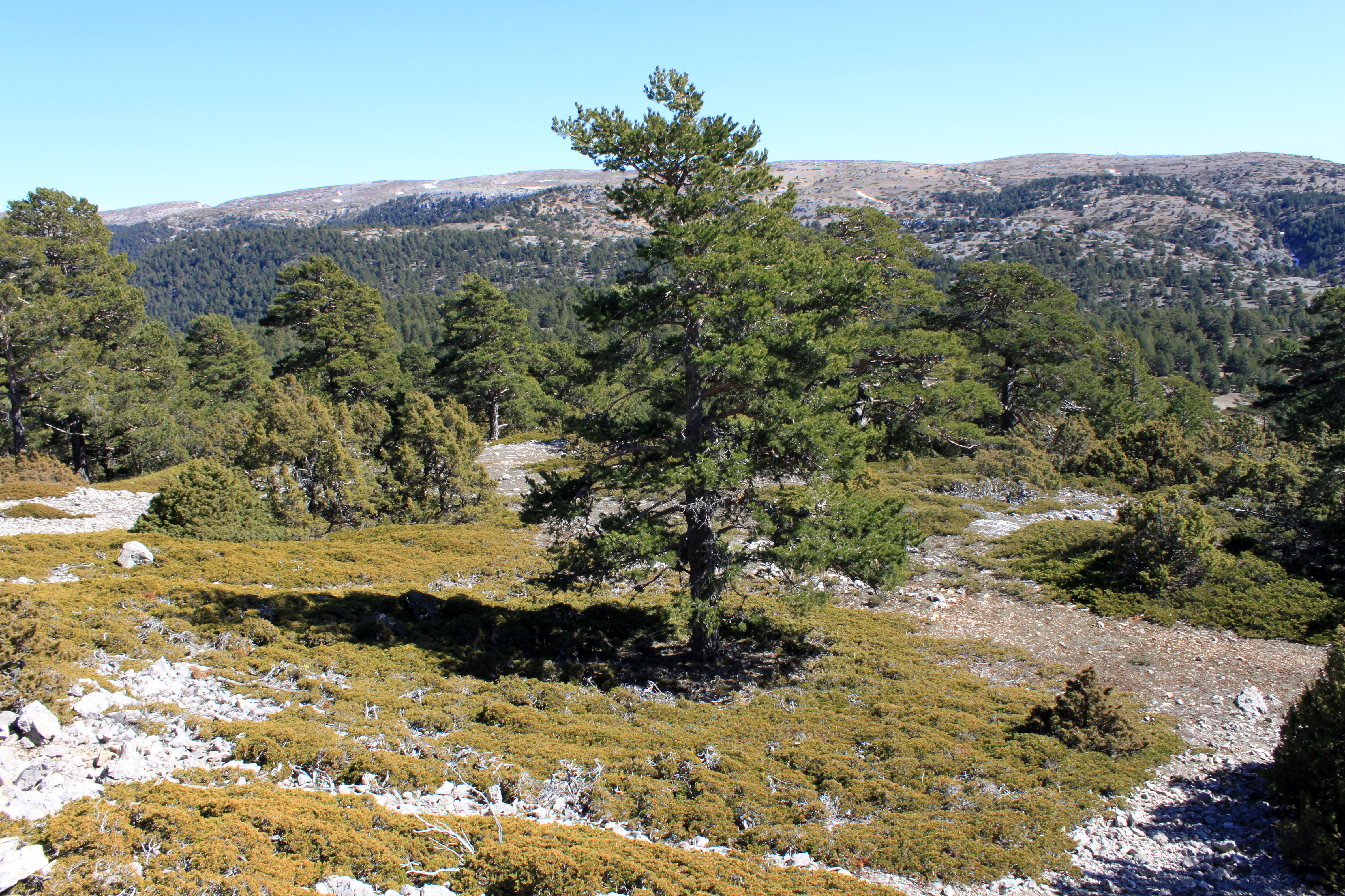 Vista del Alto de las Barracas, también llamado Cerro Calderón, situado en el parque natural de Puebla de la San Miguel. Perteneciente a la Sierra de Javalambre su punto más alto alcanza los 1837 metros. Puebla de San Miguel, provincia de Valencia, Comunidad valenciana, España.